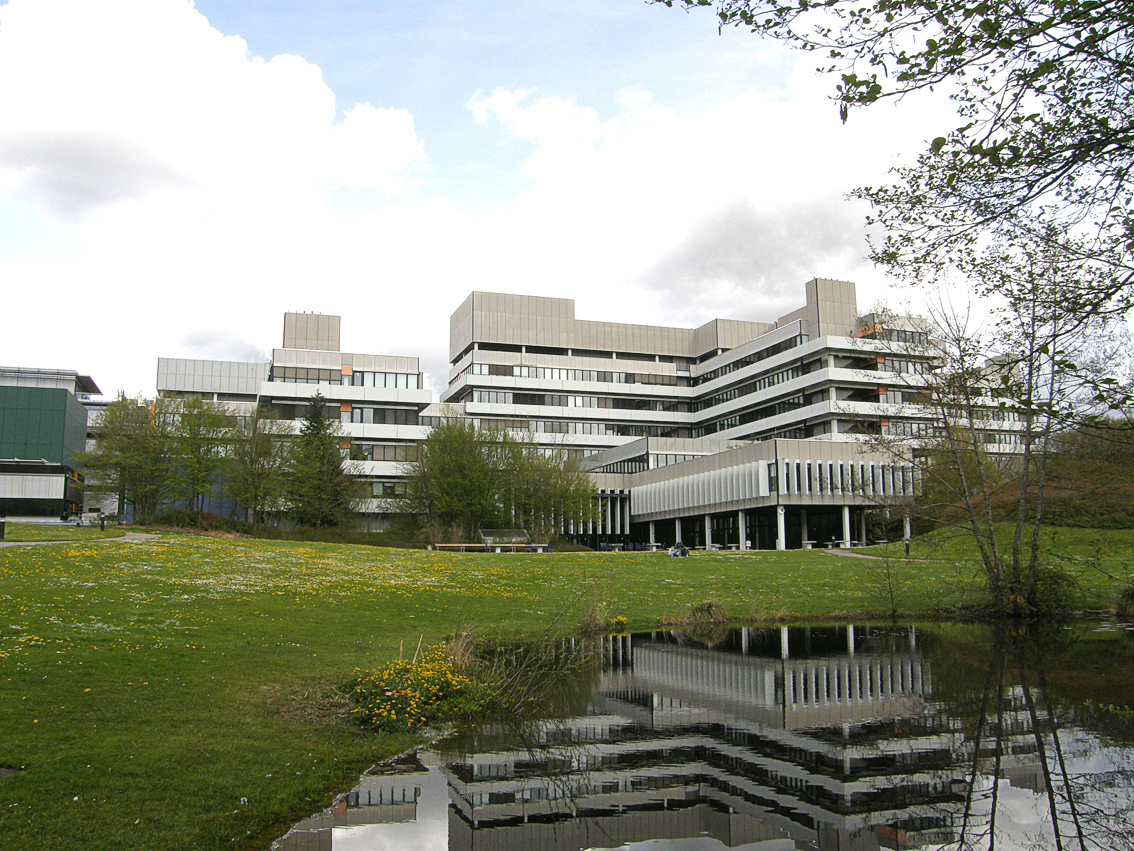 Das Max-Planck-Institut für Festkörperforschung in Stuttgart Büsnau